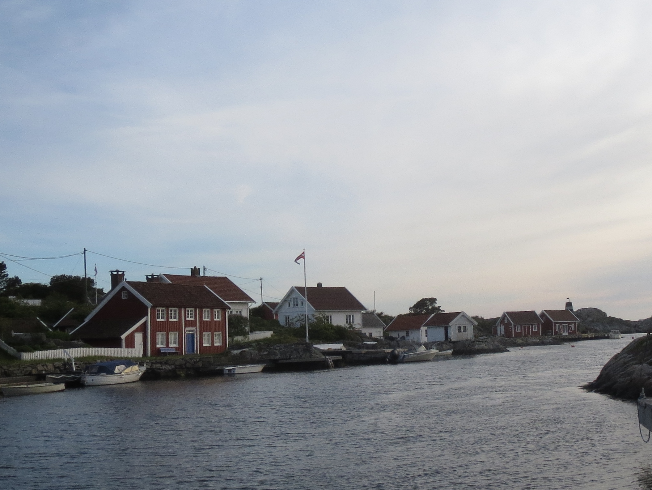 Ulvøysund